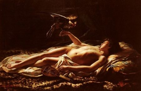 Le Fauconnier